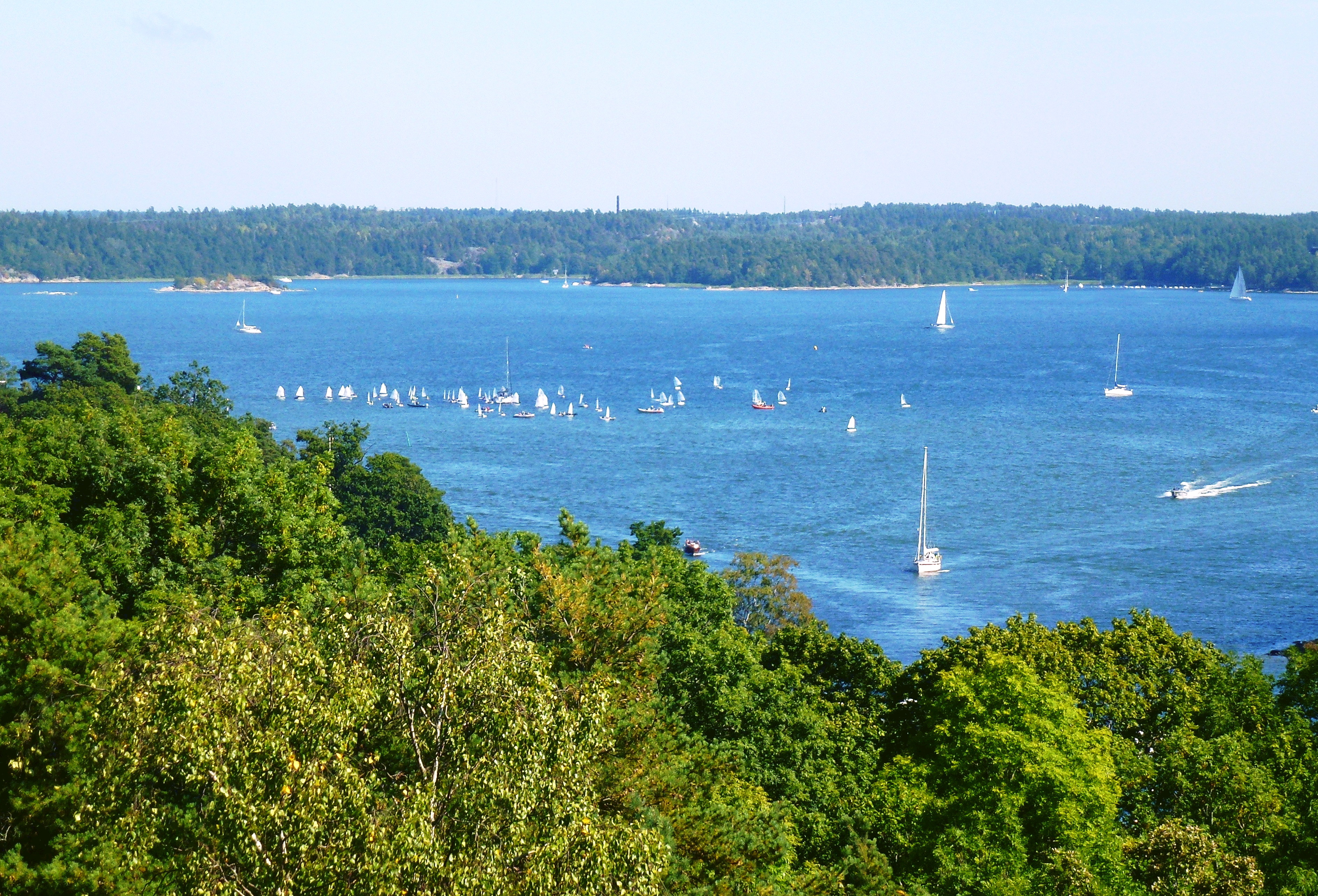 Utsikt över Baggensfjärden